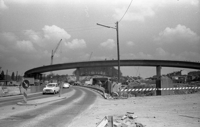 Sonnbornerkreuz in Wuppertal